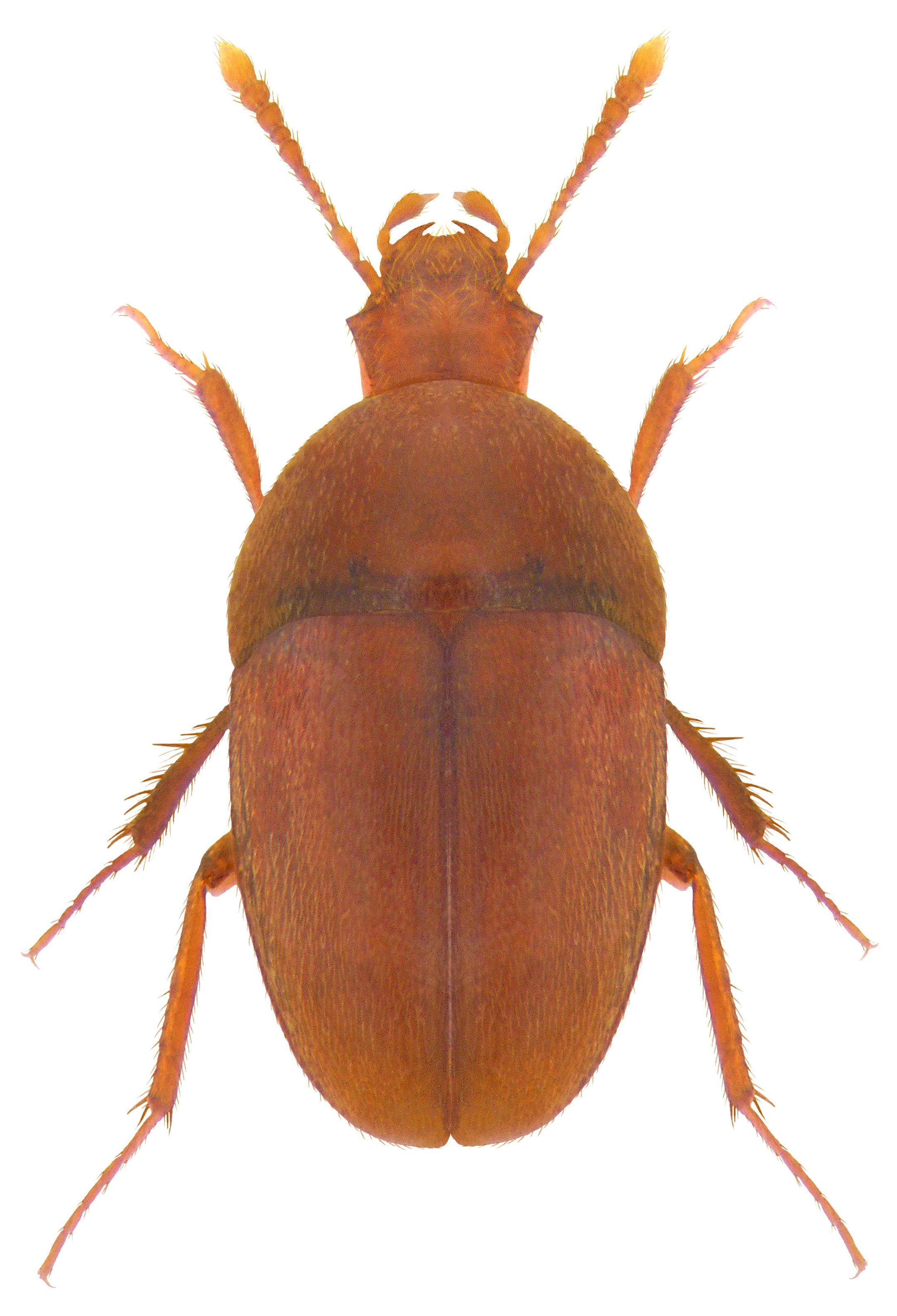 Familie: Cholevidae Groesse: 5 mm Verbreitung: N.Italien, Frankreich, S.England, S.Holland, Irland Ökologie: in faulenden Vegetabilien Fundort: England, Herefordshire, Hereford, Tupsley leg. det. J.Cooter, 1990 Photo: U.Schmidt, 2009